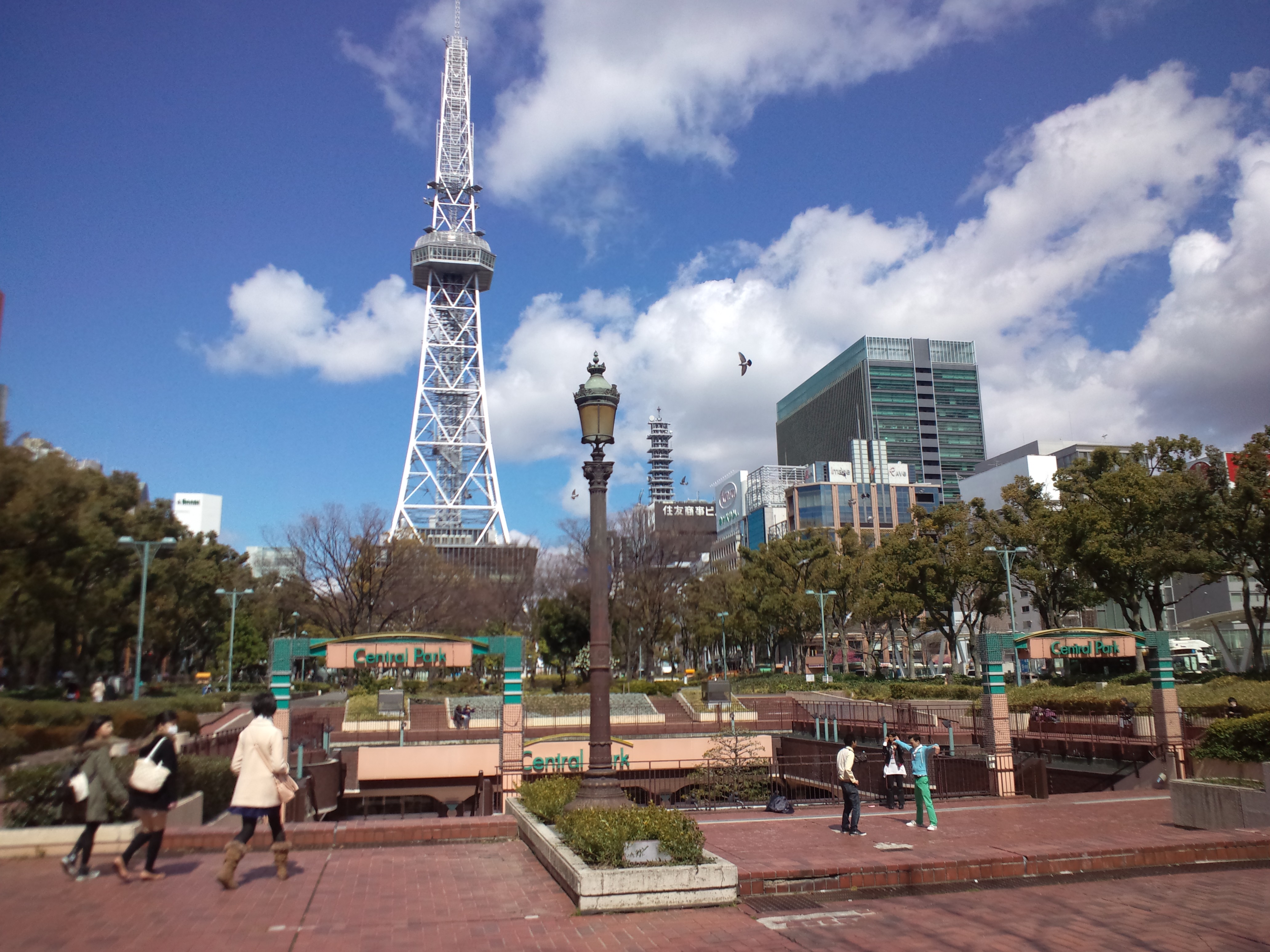 セントラル・パーク入口（名古屋）